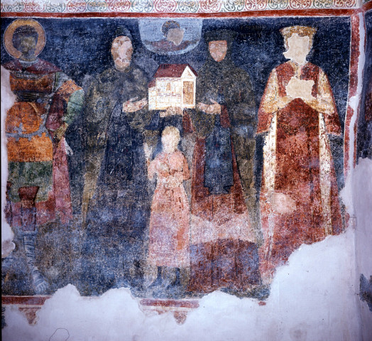 Српски (ћирилица): Фреска у цркви Св. Параскеве у Станичењу, осликана средином 14.-ог века